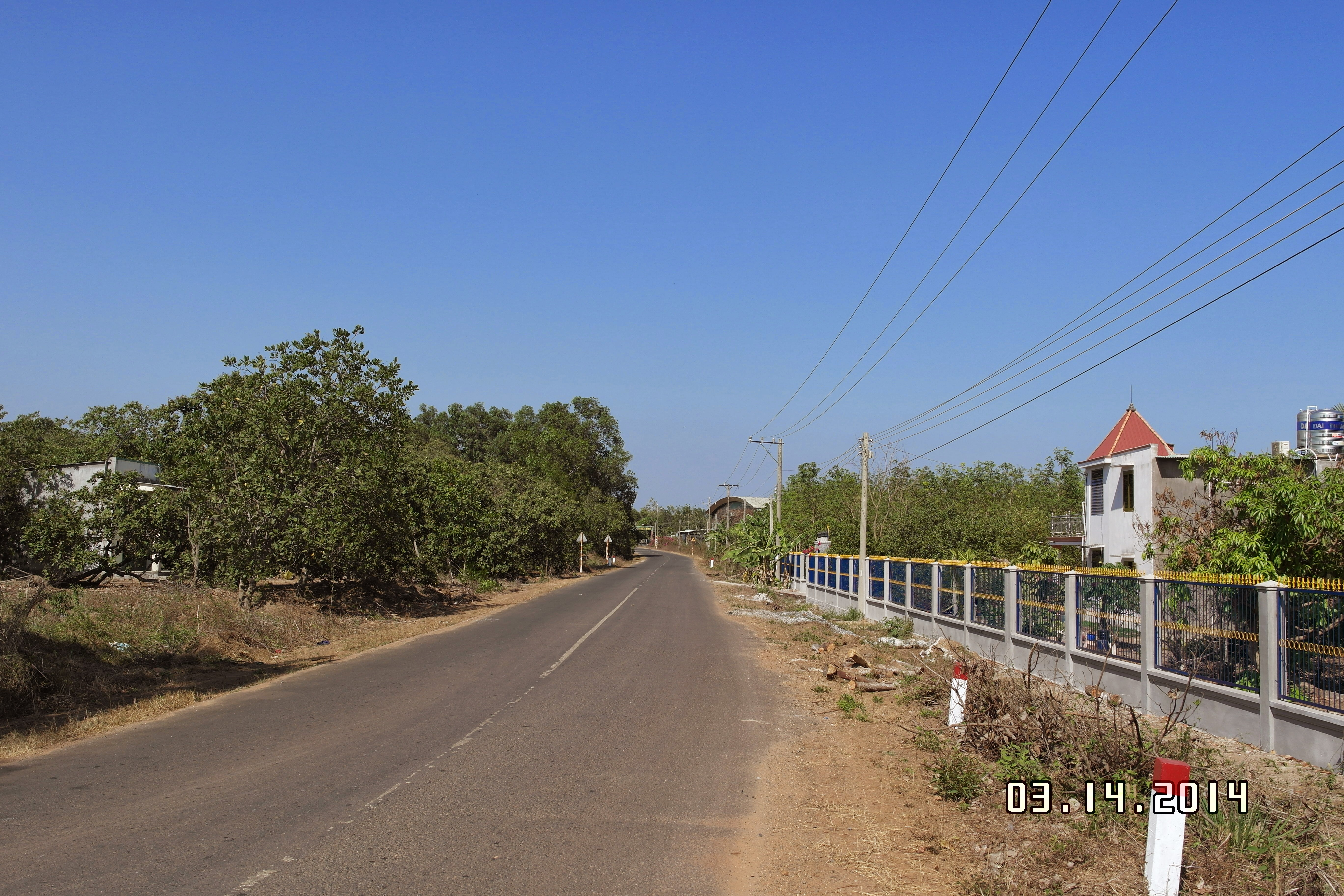 Phước Bình, Long Thành, Đồng Nai, Vietnam